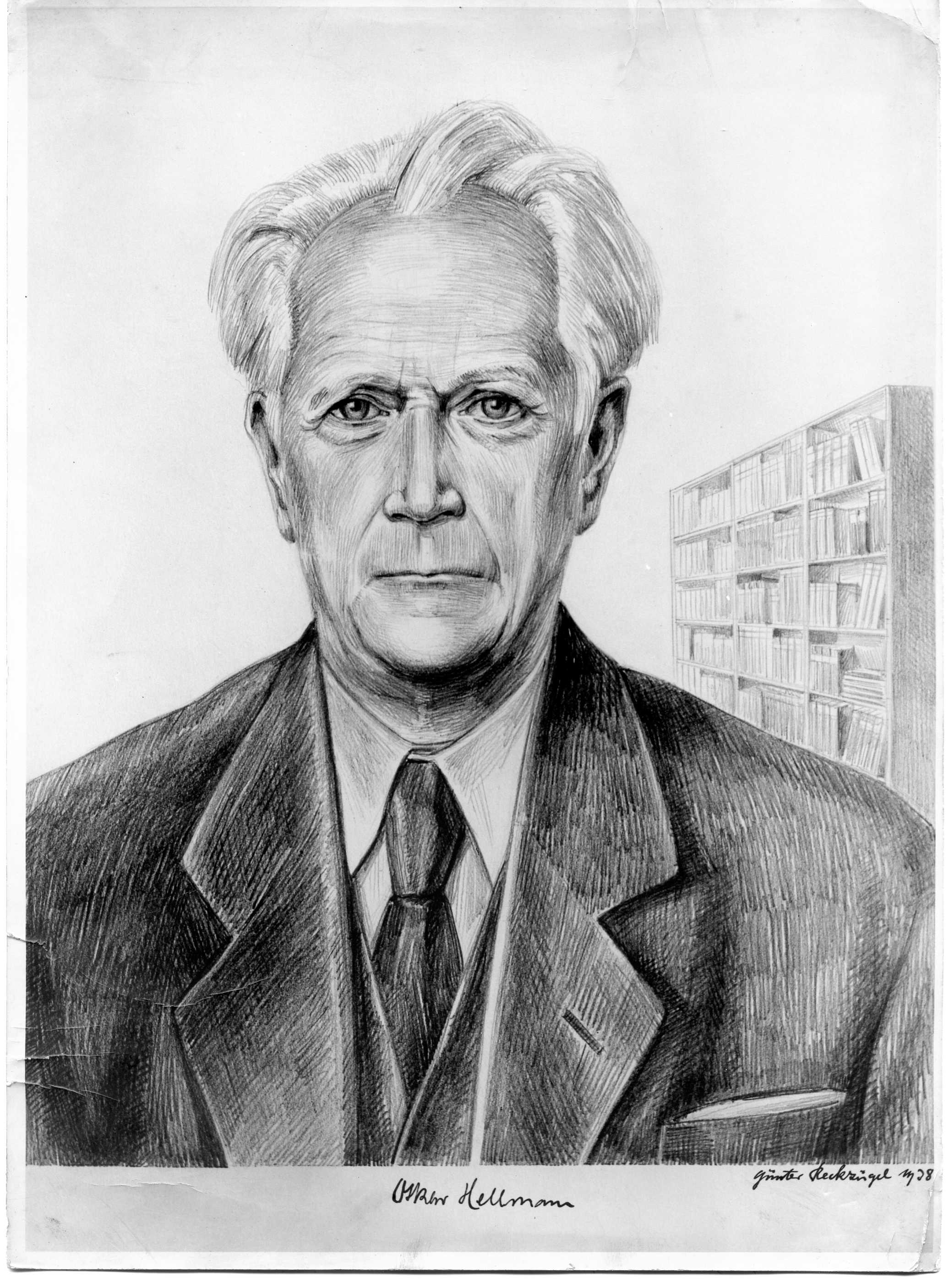 Scan einer Zeichnung aus Familienbesitz